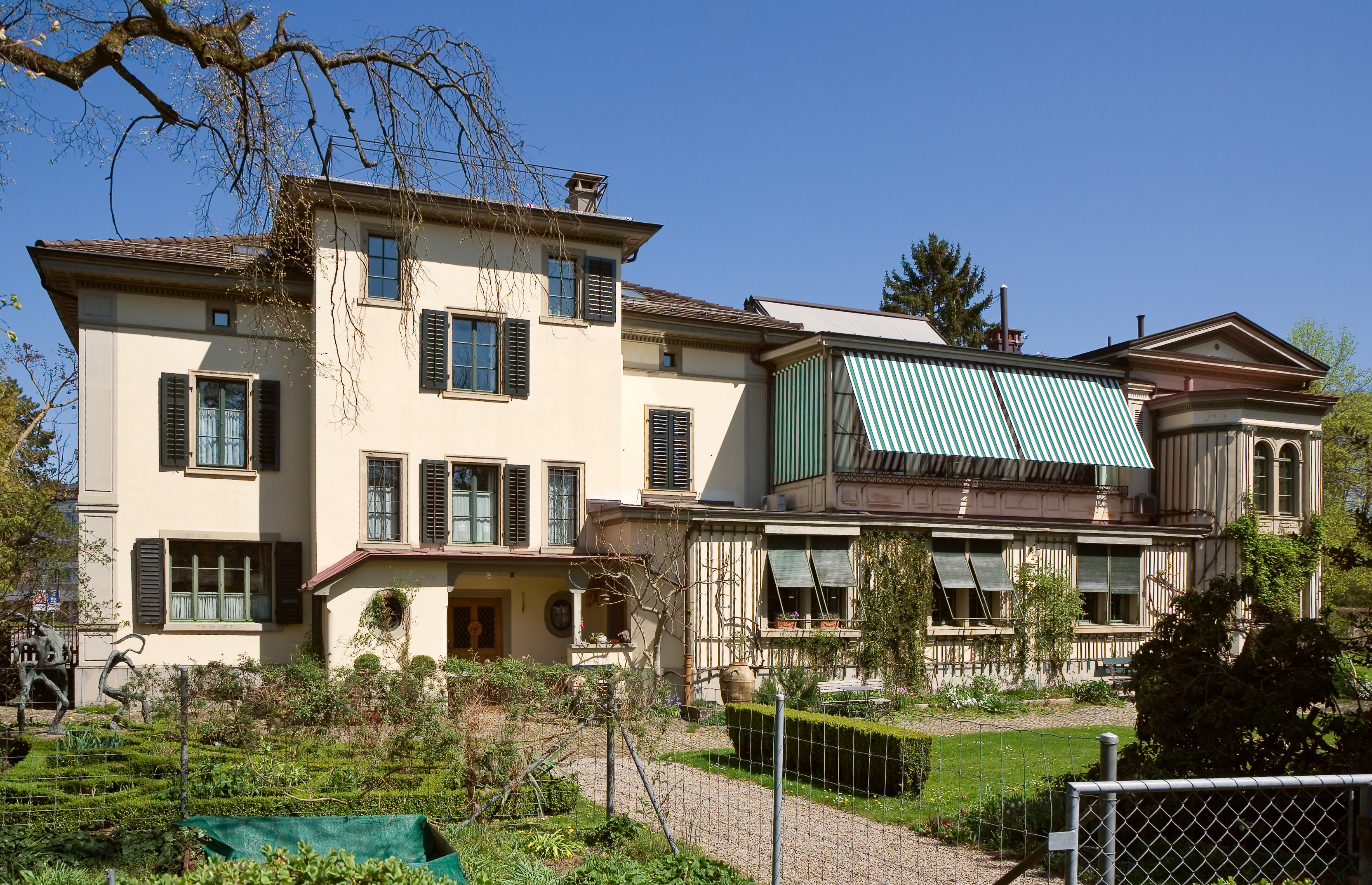 Die Villa Flora in Winterthur, Bauherr Zimmermeister Johann Heinrich Heider 1846[1]. ↑ Andreas Hauser: Winterthur. Inventar der neueren Schweizer Architektur